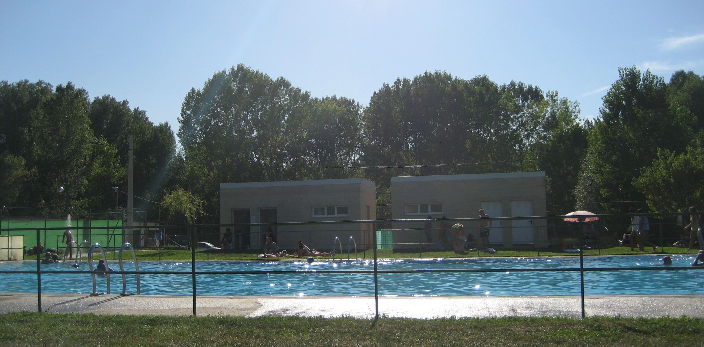 Panorámica de la piscina de Albares de la Ribera